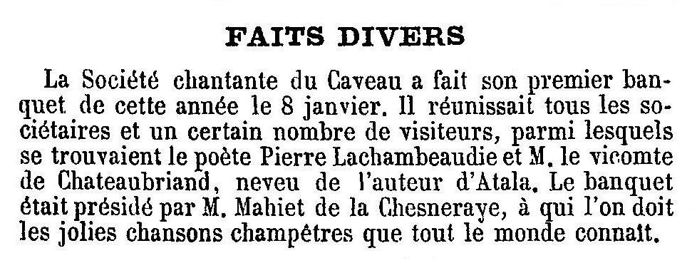 Annonce de la première réunion de l'année 1864 de la célèbre goguette du Caveau, quatrième du nom.